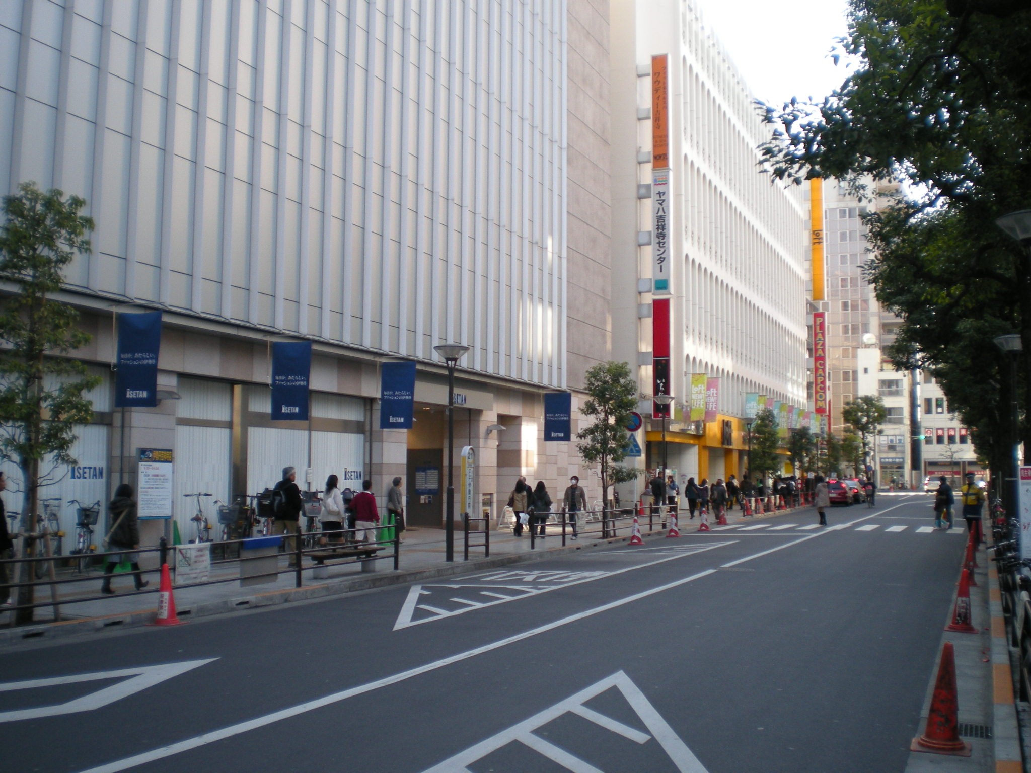 Kichijoji